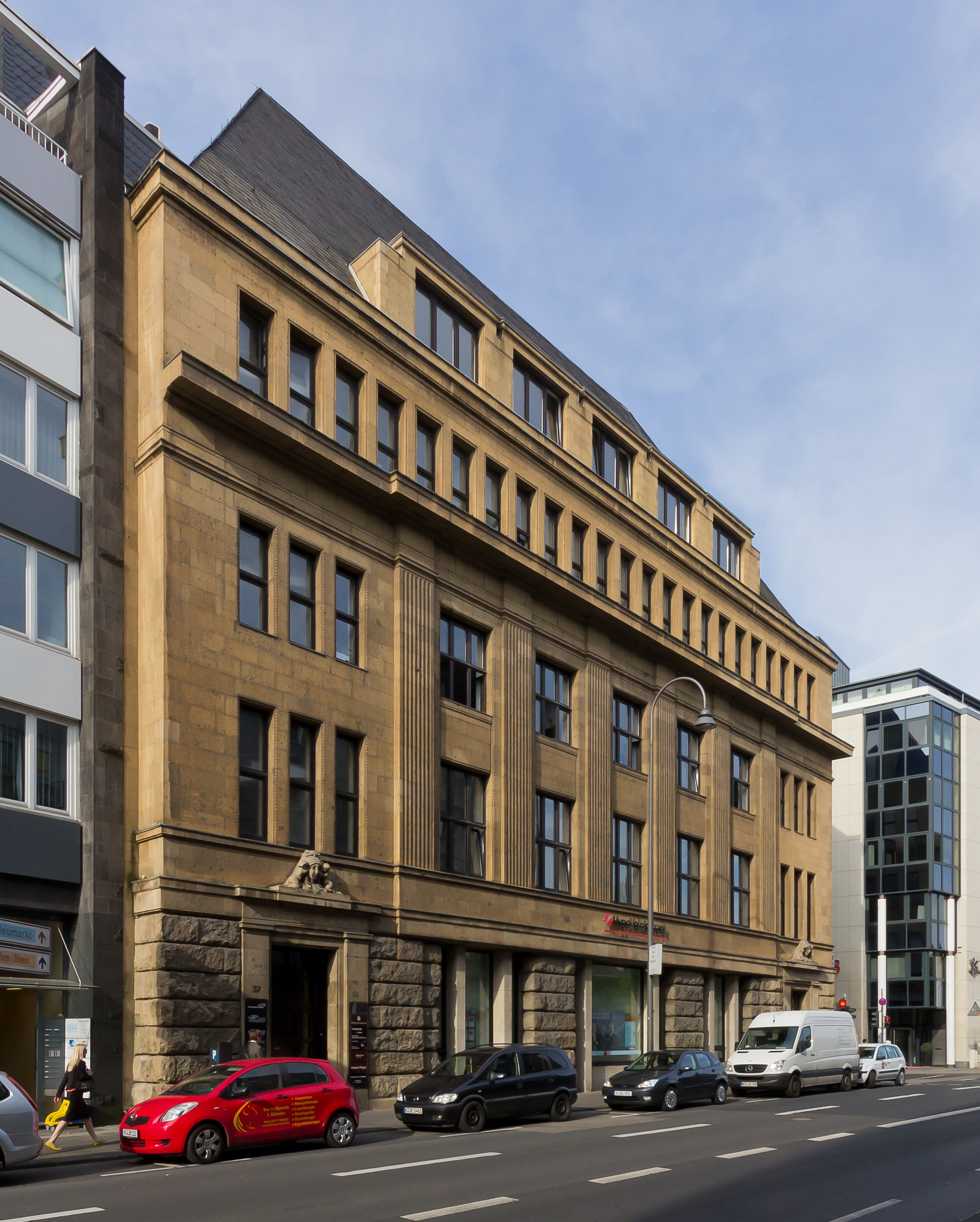 Denkmalgeschütztes Geschäfts- und Verwaltungsgebäude, Ecke Unter Sachsenhausen/Kattenbug, Köln. Architekt: Peter Behrens, Bauzeit: 1914